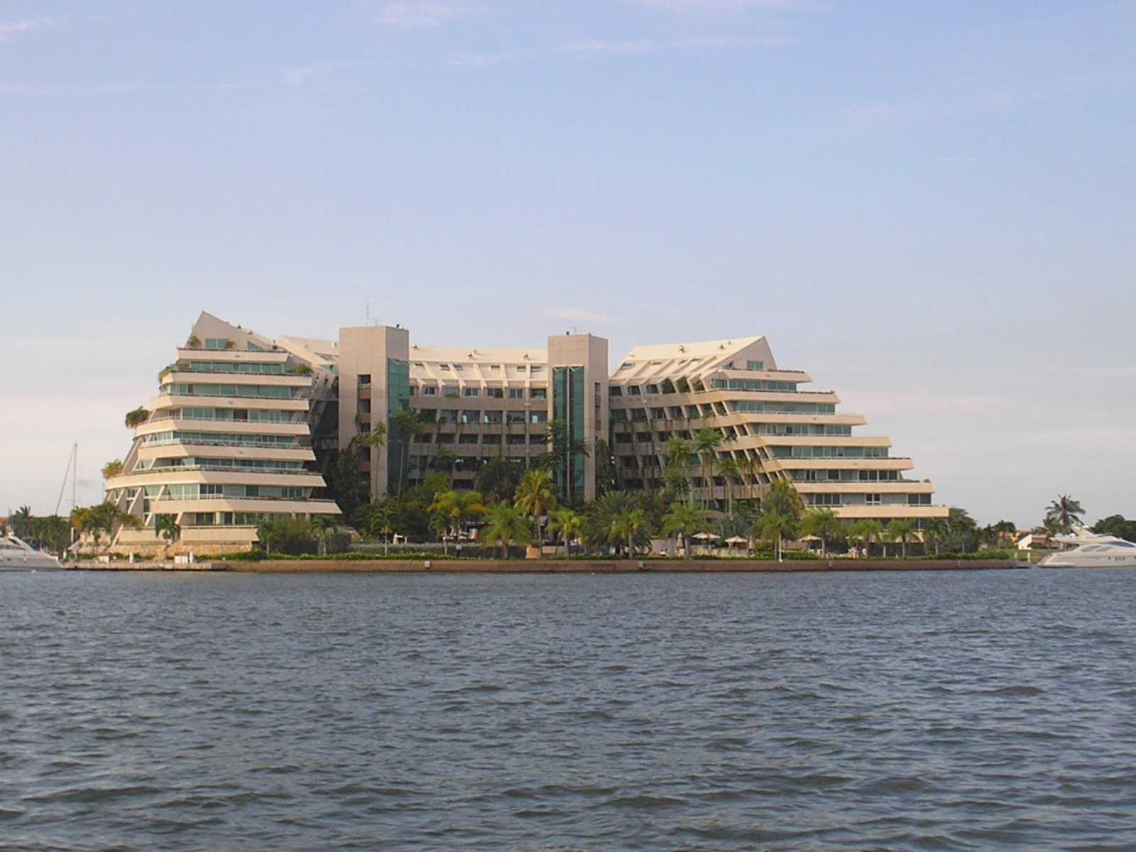 Hotel que se ubica en la Isla artificial Paraíso, Puerto Morro, Lechería, edo. Anzoátegui.